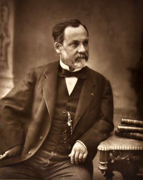 Louis Pasteur from Series: Galerie Contemporaine